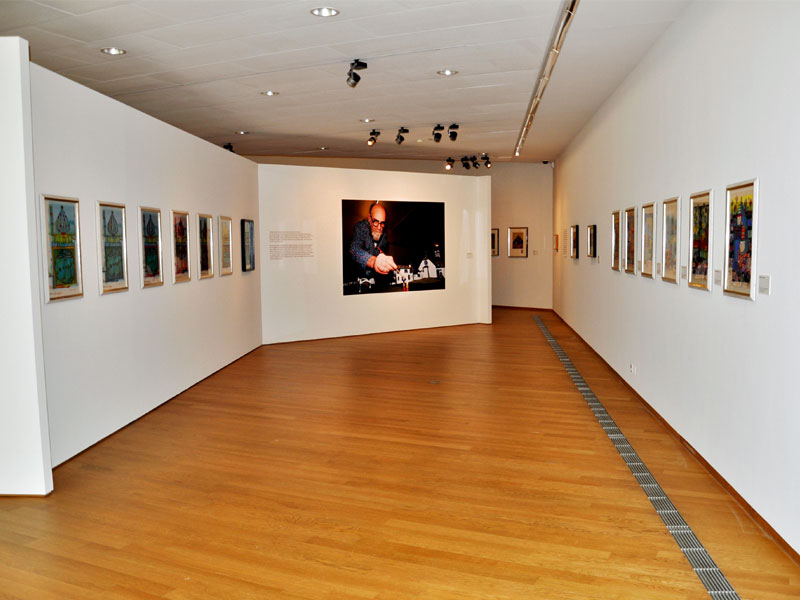 Ausstellung „Friedensreich Hundertwasser – Die Ernte der Träume“ im Forum Würth Arlesheim. Die Gemälde und Grafiken aus der Sammlung Würth geben einen aufschlussreichen Überblick über das Werk Hundertwassers von den 1950er bis in die 1990er Jahre.